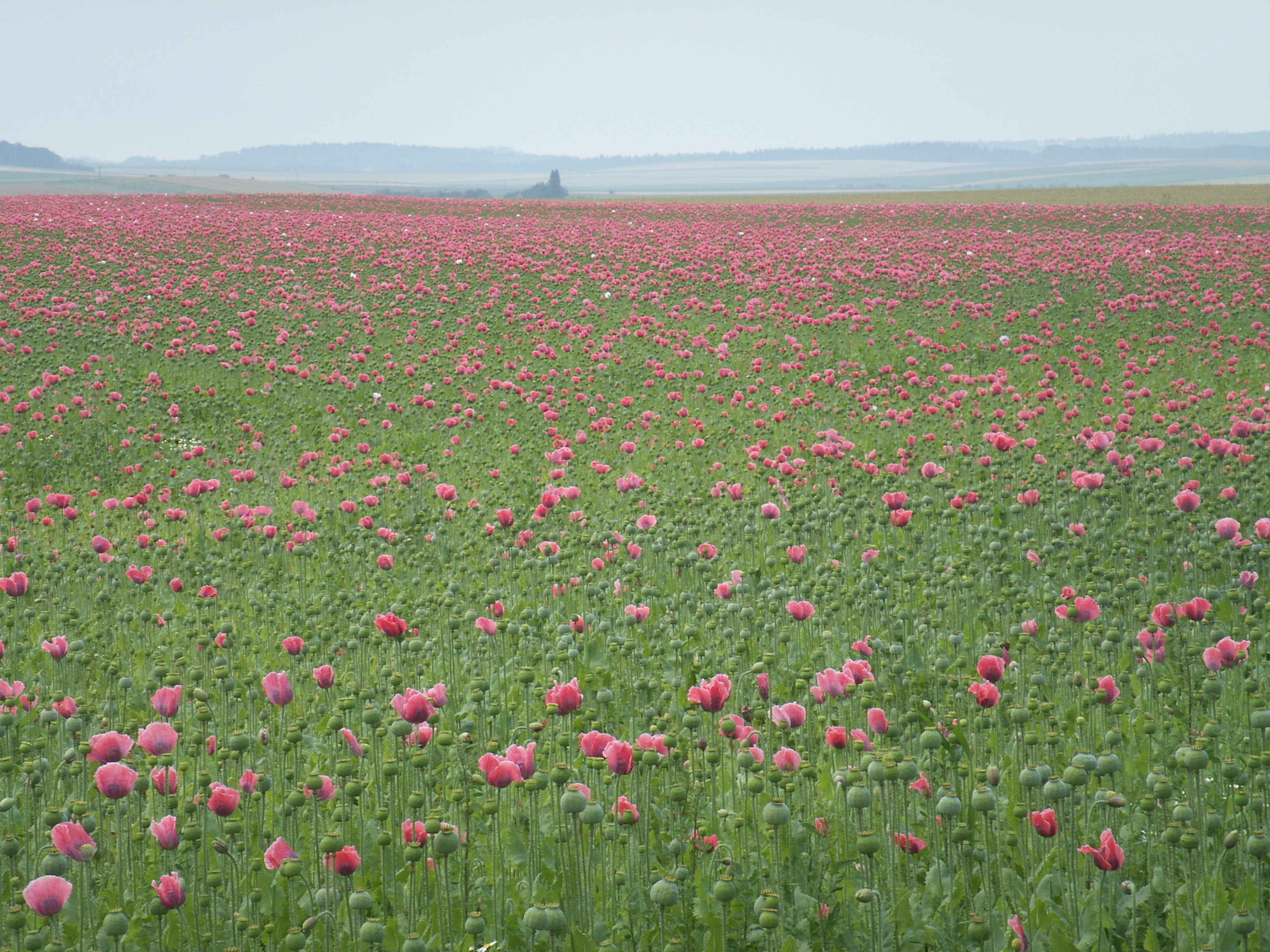 Papaver somniferum, Schlafmohnfeld (Waldviertel, Niederösterreich)